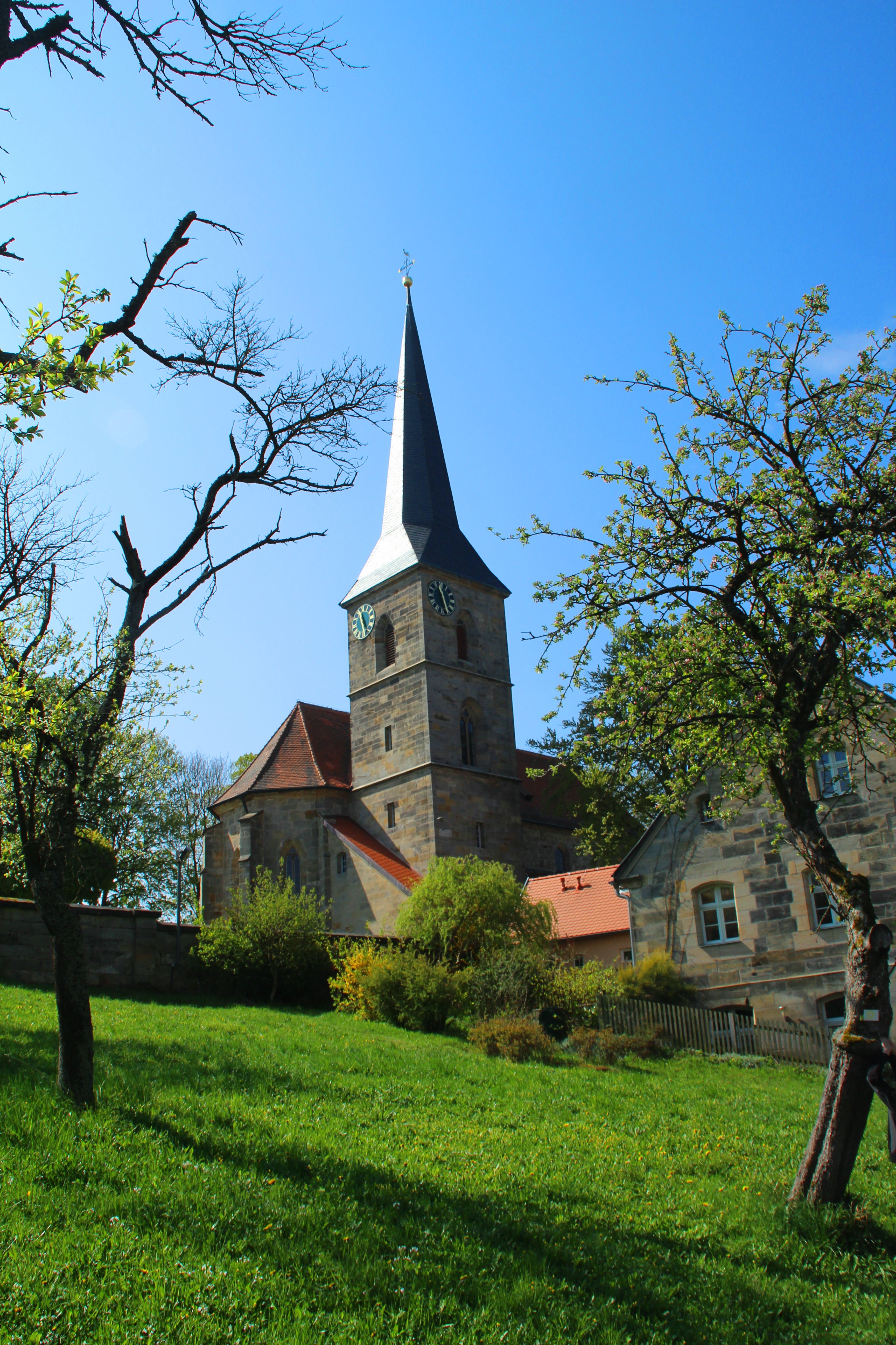 Kirchenburg in Gesees Oberfranken